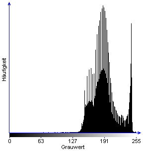 Histogramm